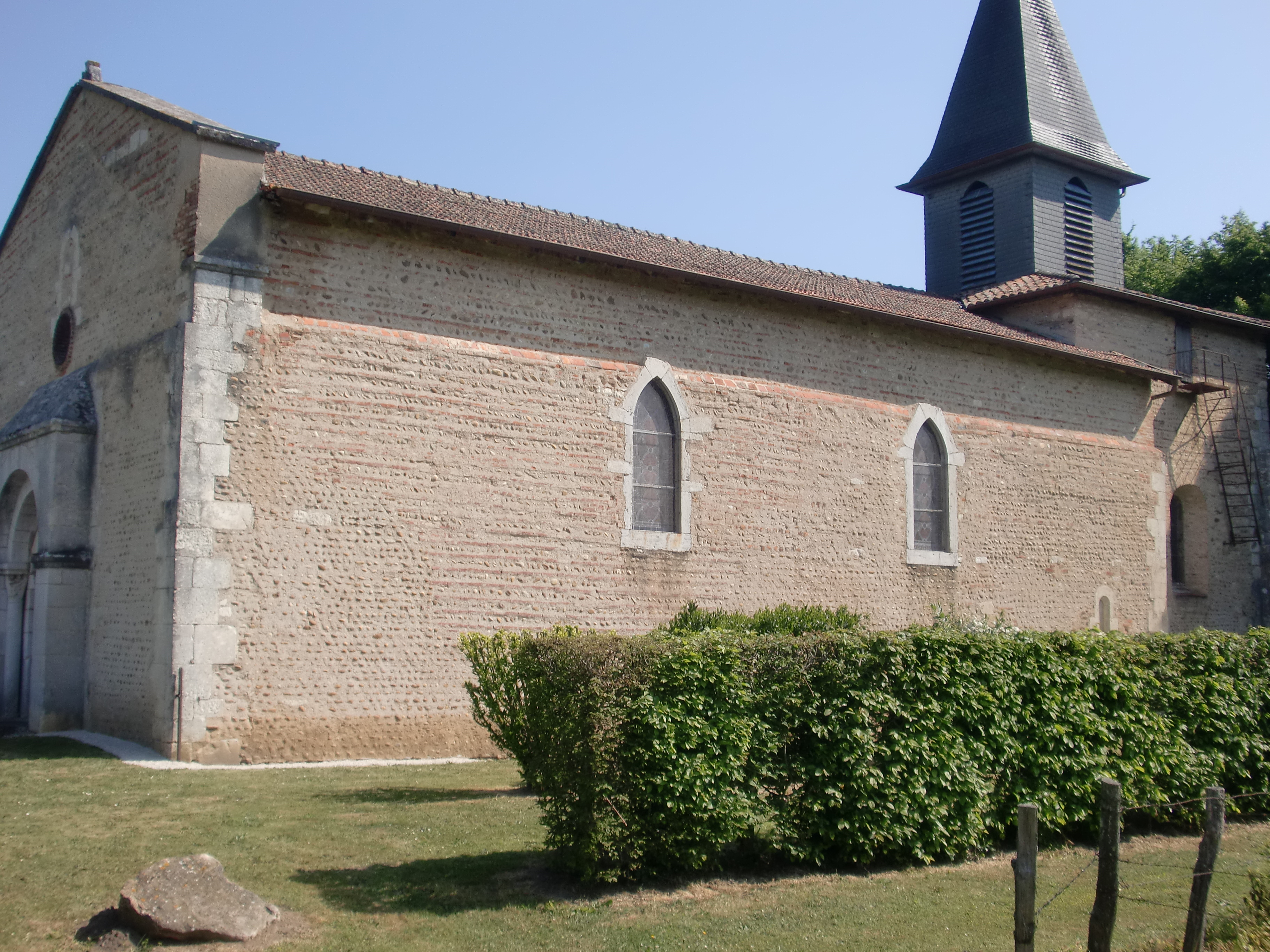 Église de Saint-Germain sur Renon